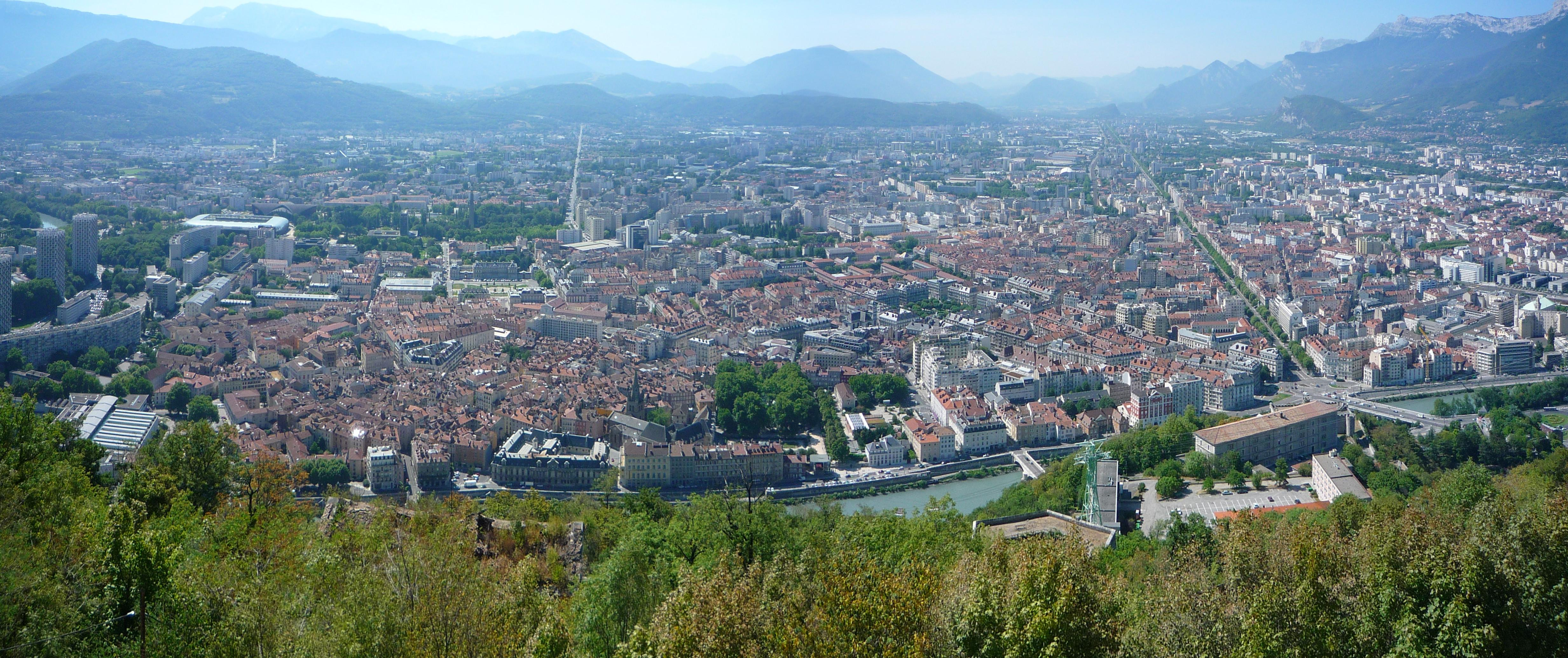 Panorama de Grenoble